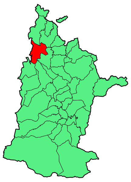 Aipaturiko udalerriaren kokapena Zuberoan